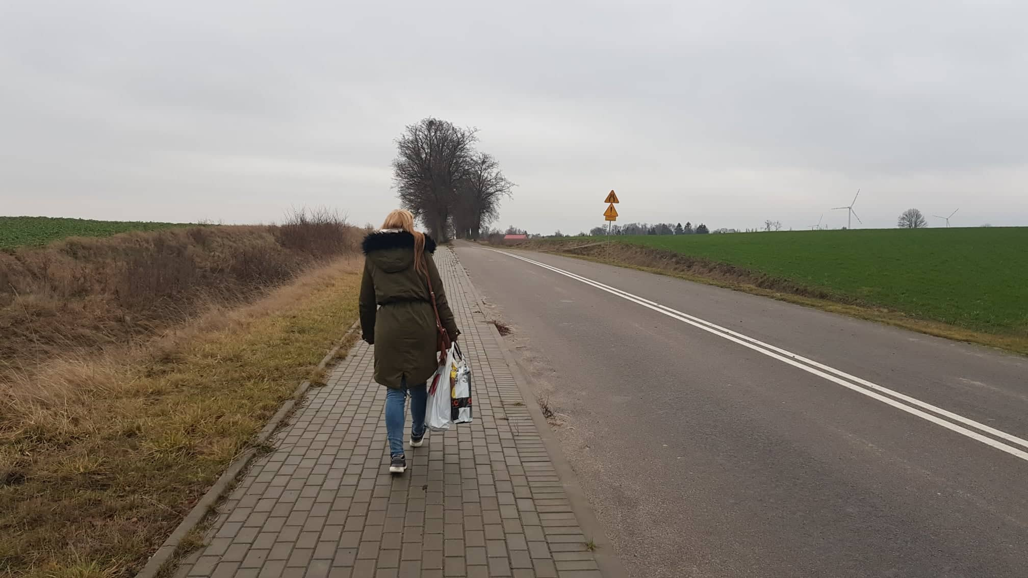 Droga dojazdowa od stacji kolejowej Gronajny do wsi.